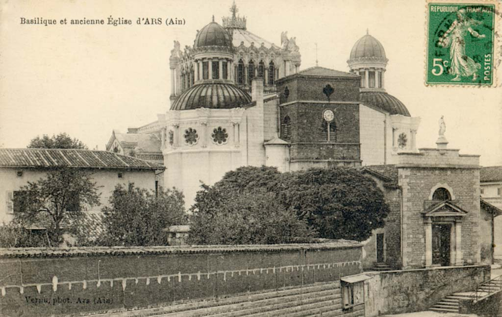 Ars-sur-Formans, Basilique de Saint Jean-Marie Vianney avec la vieille église paroissiale; Photographie historique